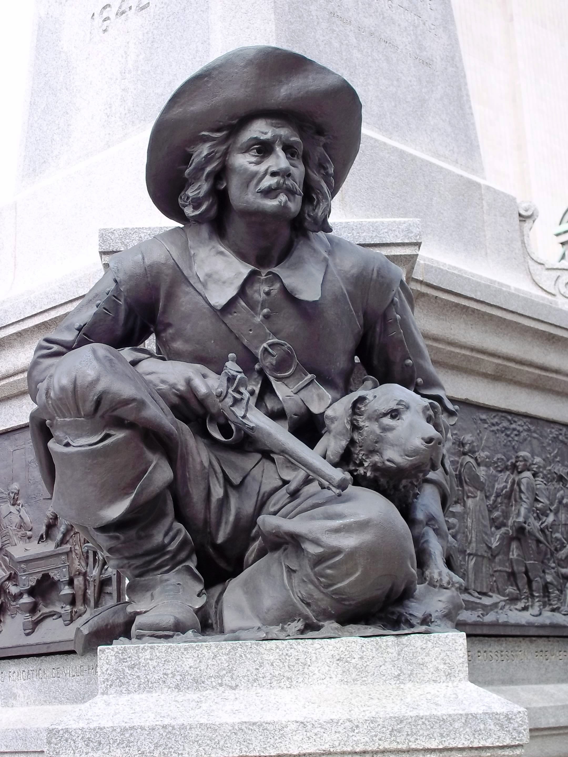 Lambert Closse au Monument à Maisonneuve, Place d'Armes, Montréal